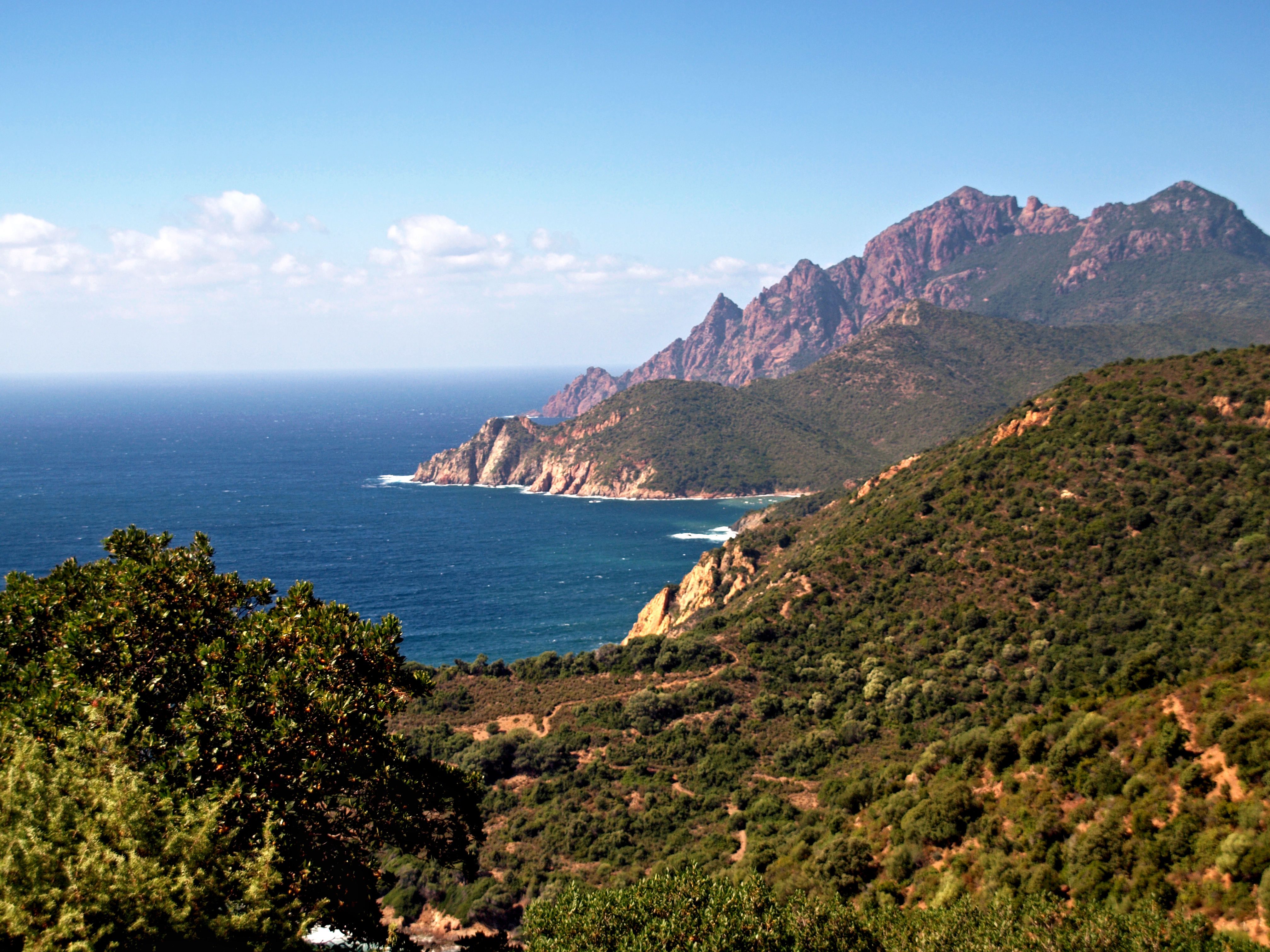 Osani (Corsica) - Vue de la rive nord du golfe de Porto - littoral occidental d'Osani (Punta di Latone, Punta â Scopa, Monte Senino et Punta Castellucciu)